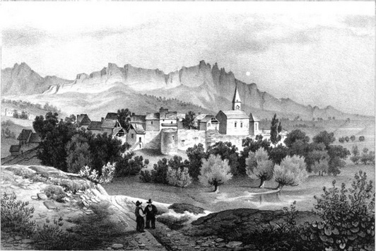 Chorges